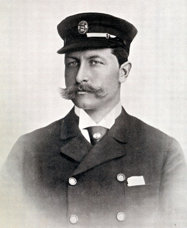 Moritz Kurt von Zedtwitz